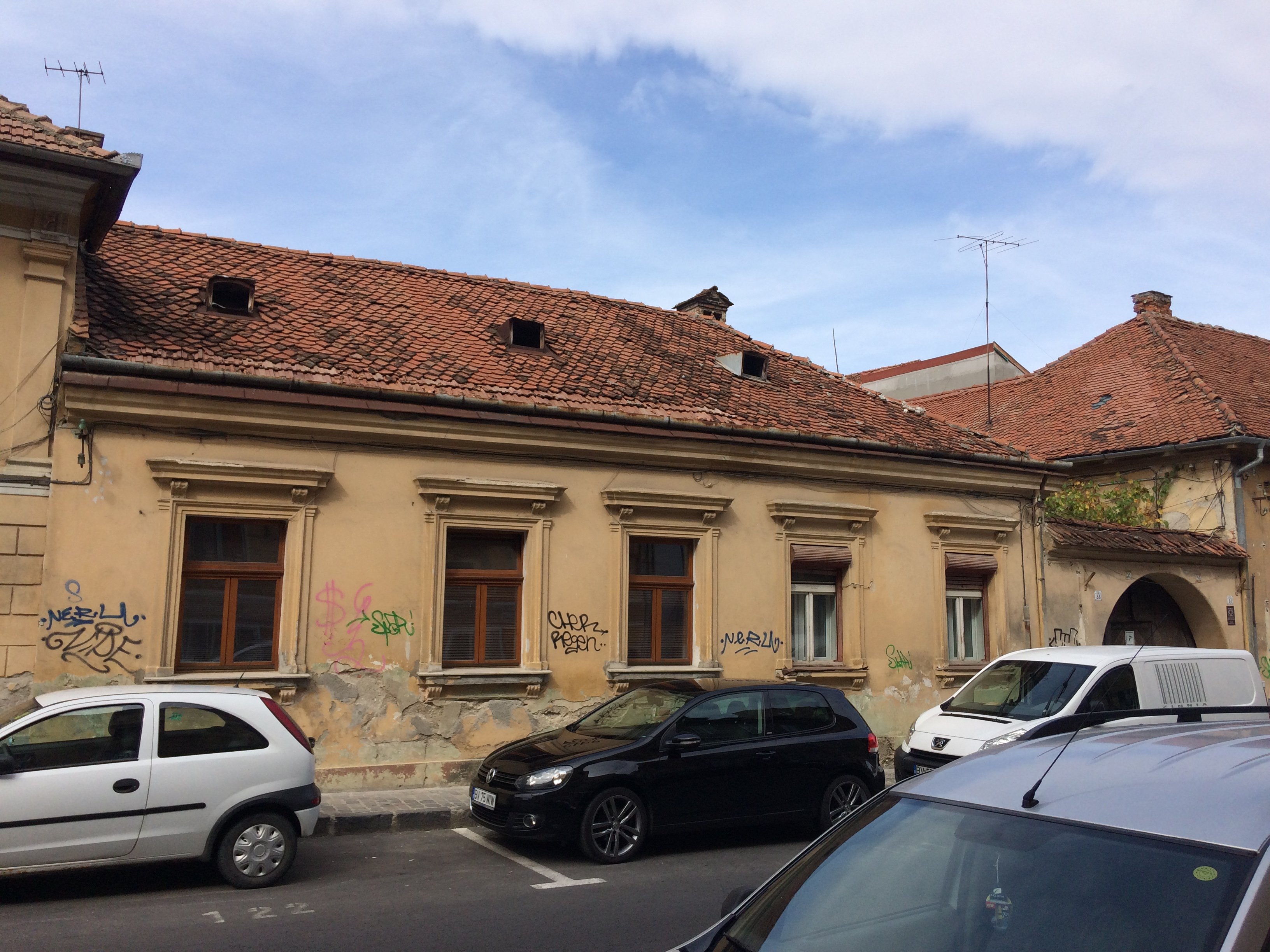 Casa brașoveana